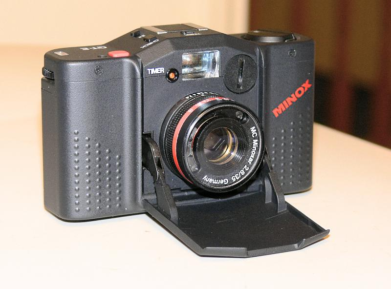 Minox GT-E compact 35mm camera